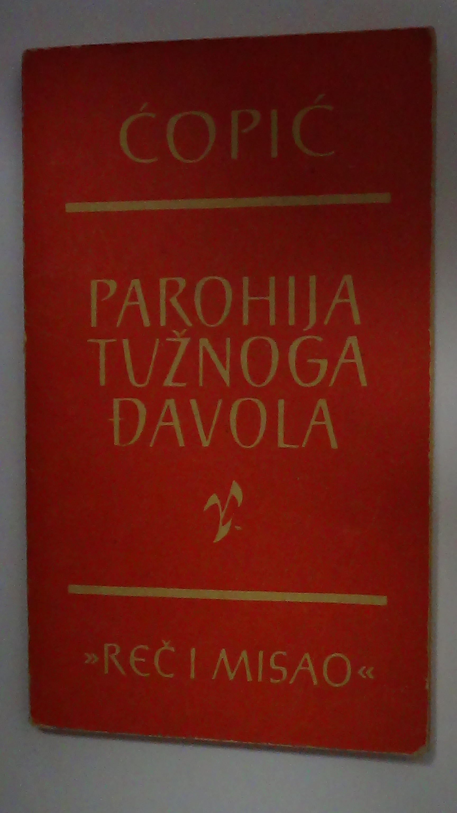 „Парохијата на тажниот ѓавол“, Рад, Белград, 1964.